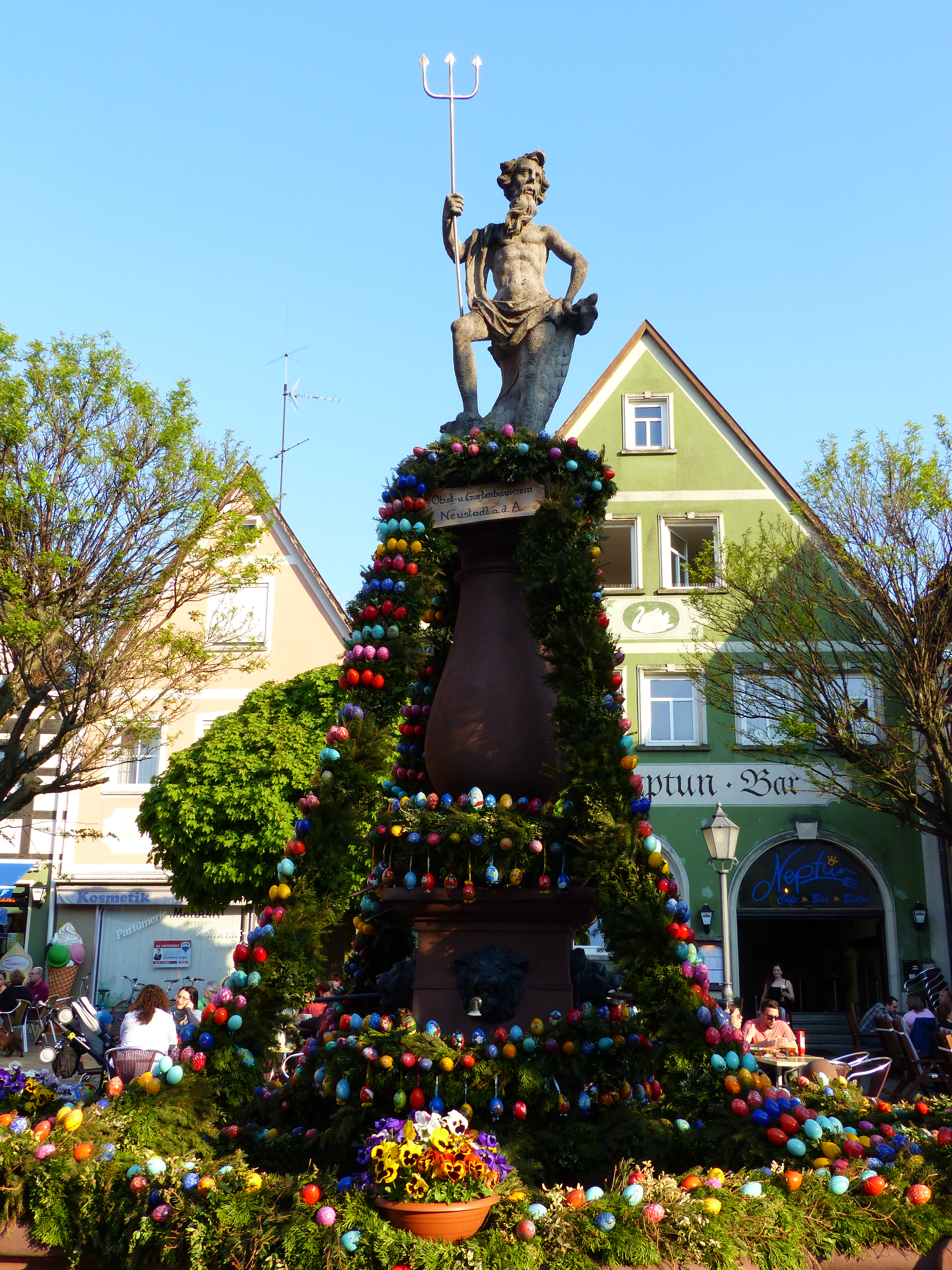 Osterbrunnen in Neustadt an der Aisch. Mittelfranken